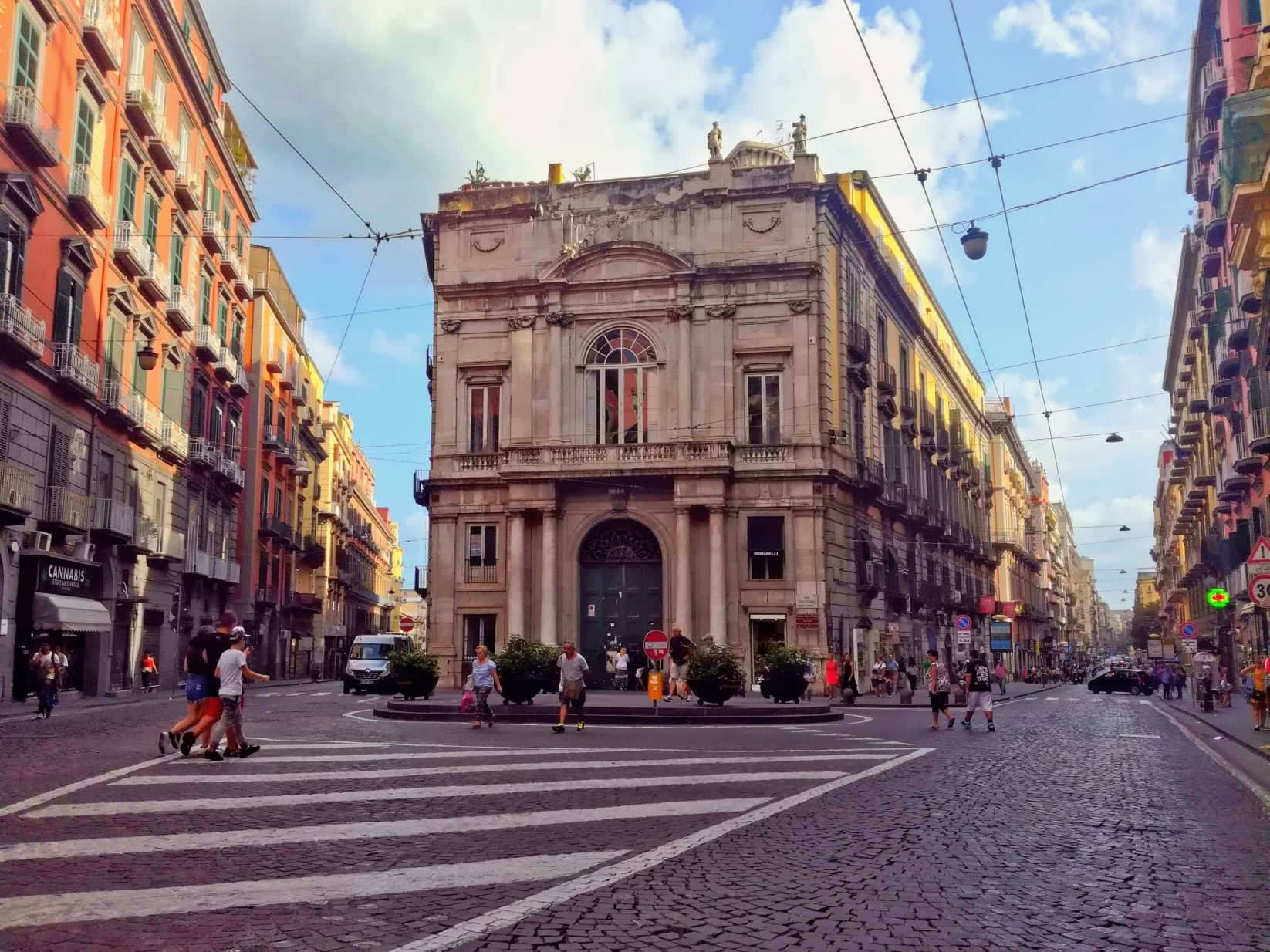 Palazzo Doria